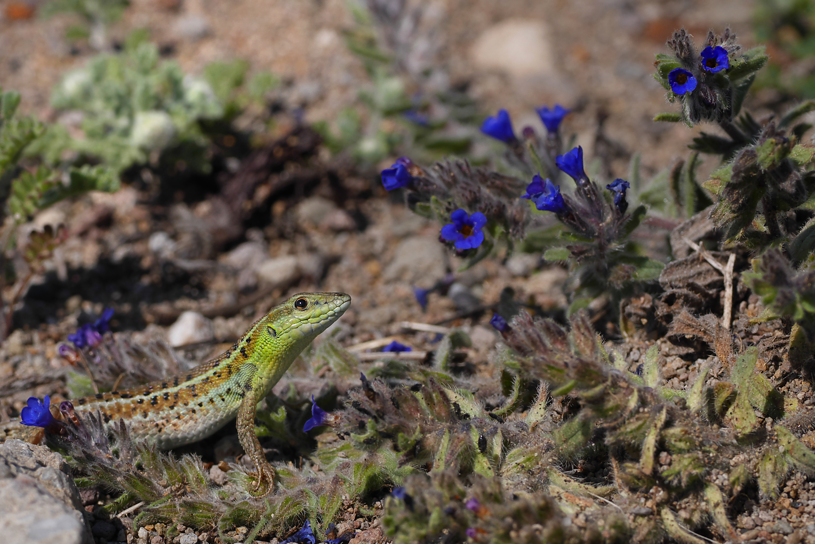 Panasonic GX7 + Leica DG Macro-Elmarit 45mm F2.8 ASPH OIS